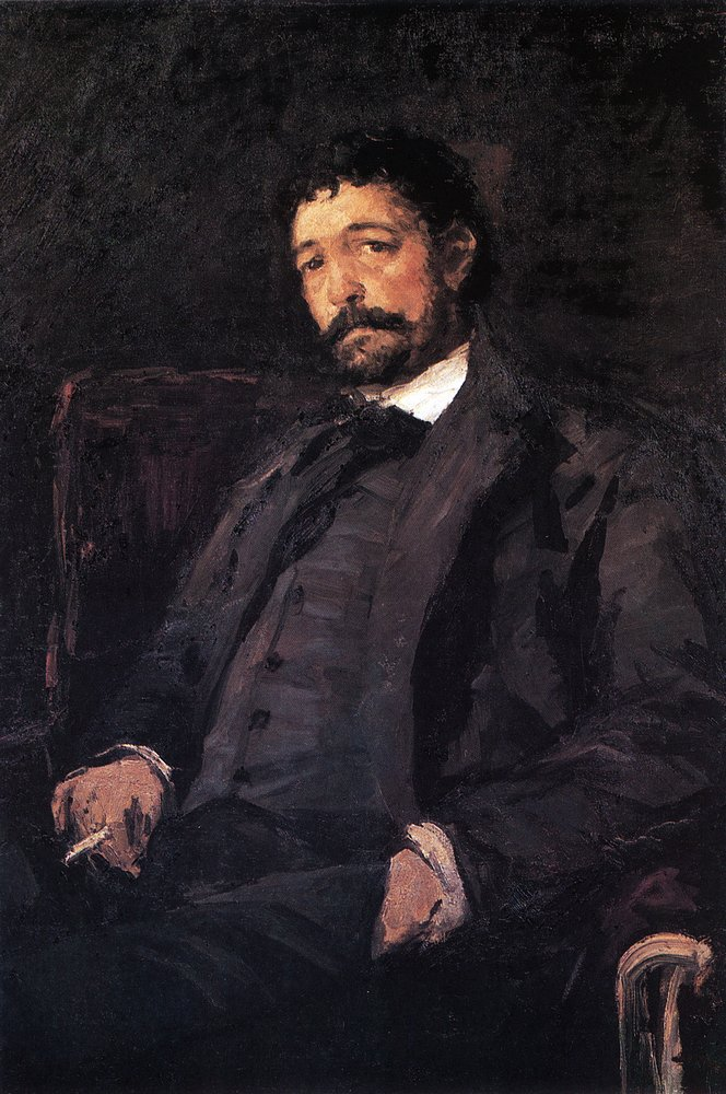 Портрет итальянского певца Анджело Мазини. 1890